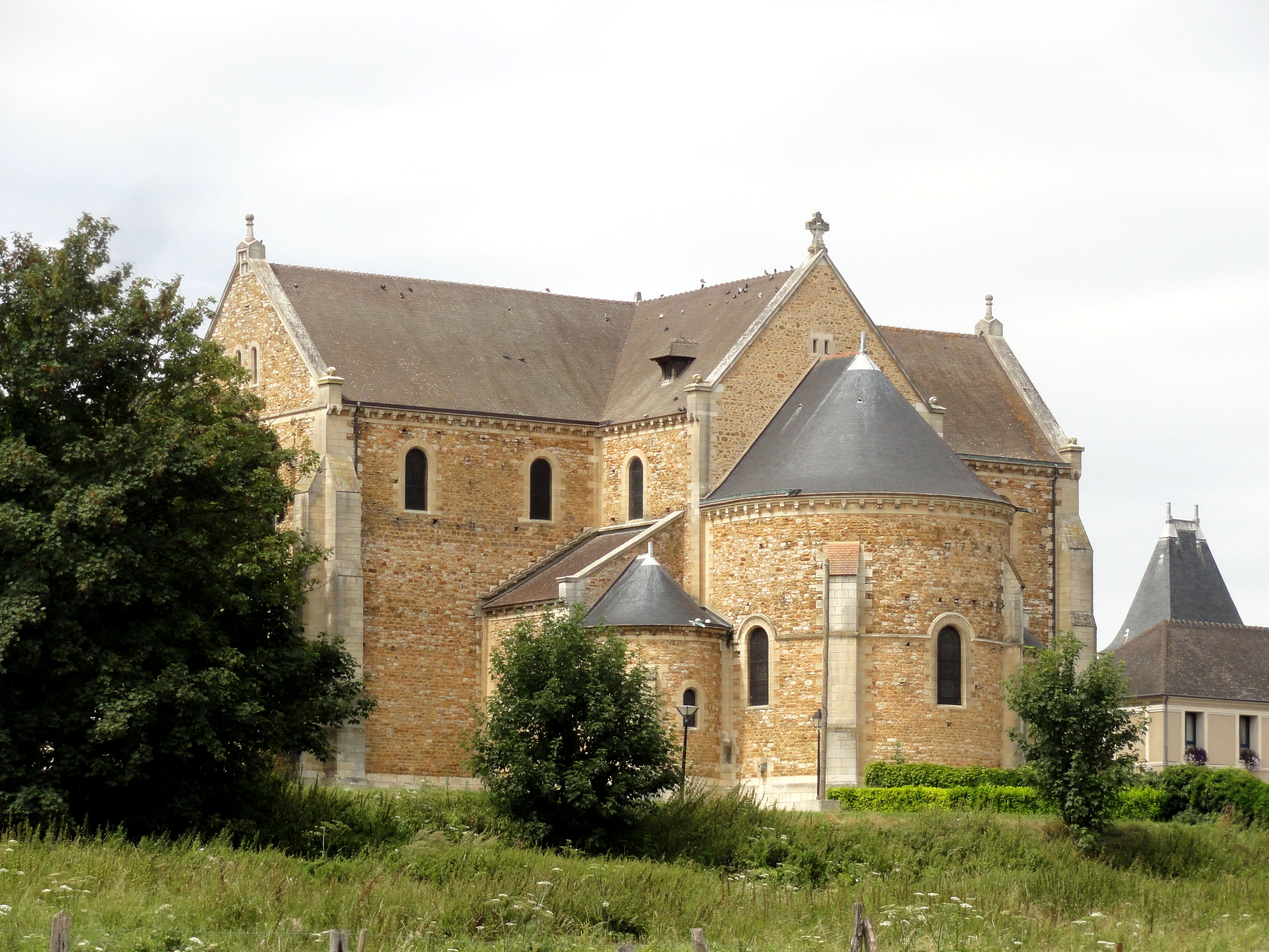 Vue depuis le sud-est.